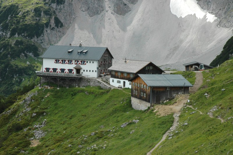 Gruttenhutte